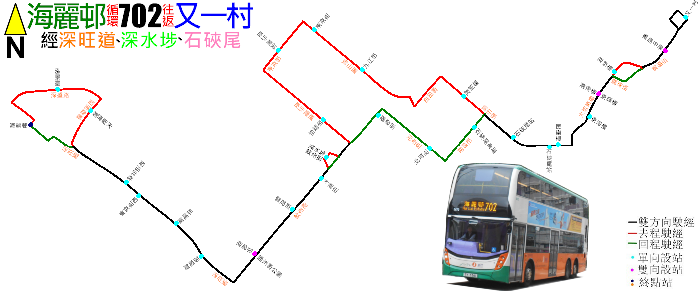 中文（香港）: 新巴702線的走線圖